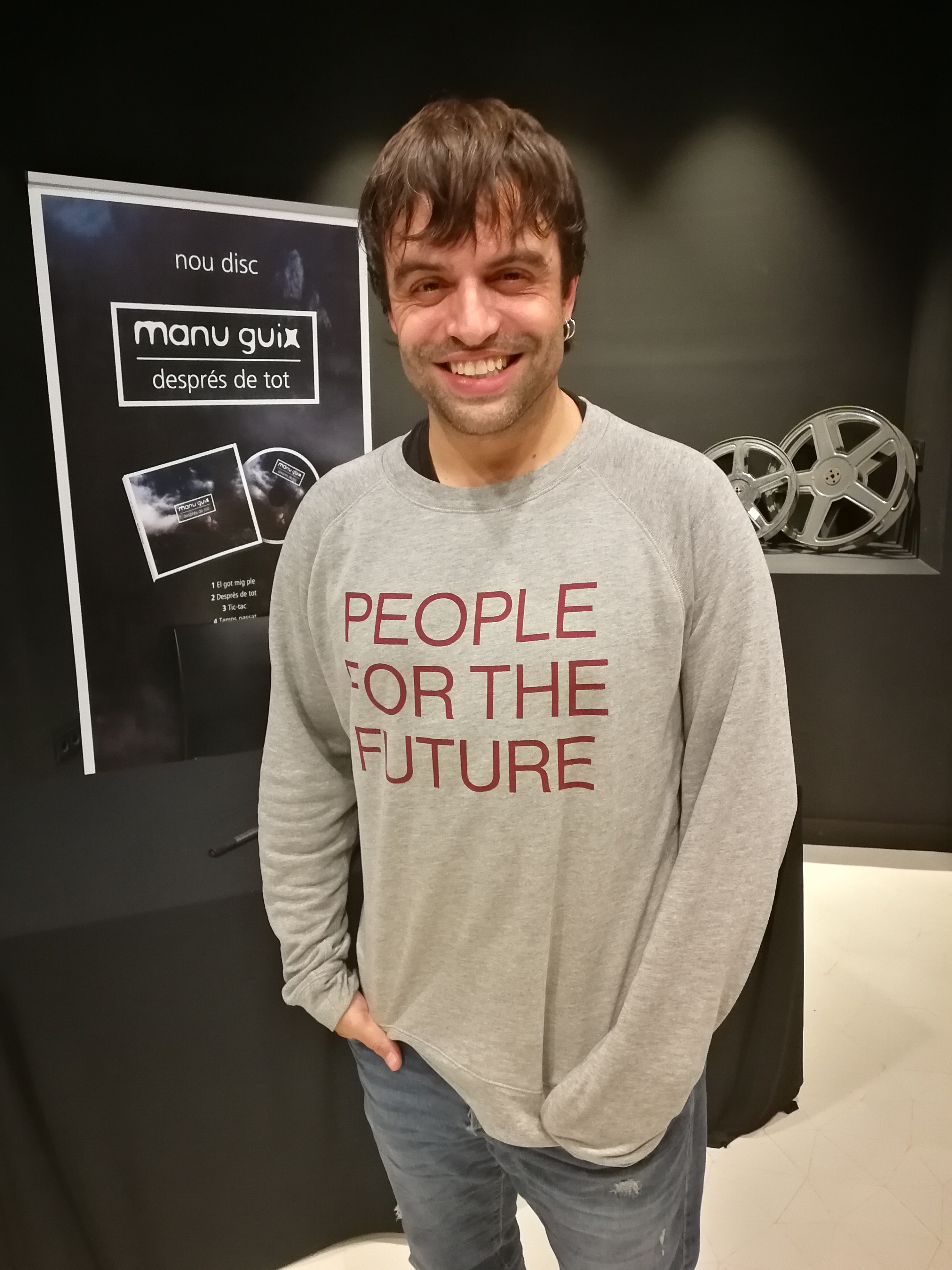 Manu guix a l auditori Valentí Fuster de Cardona